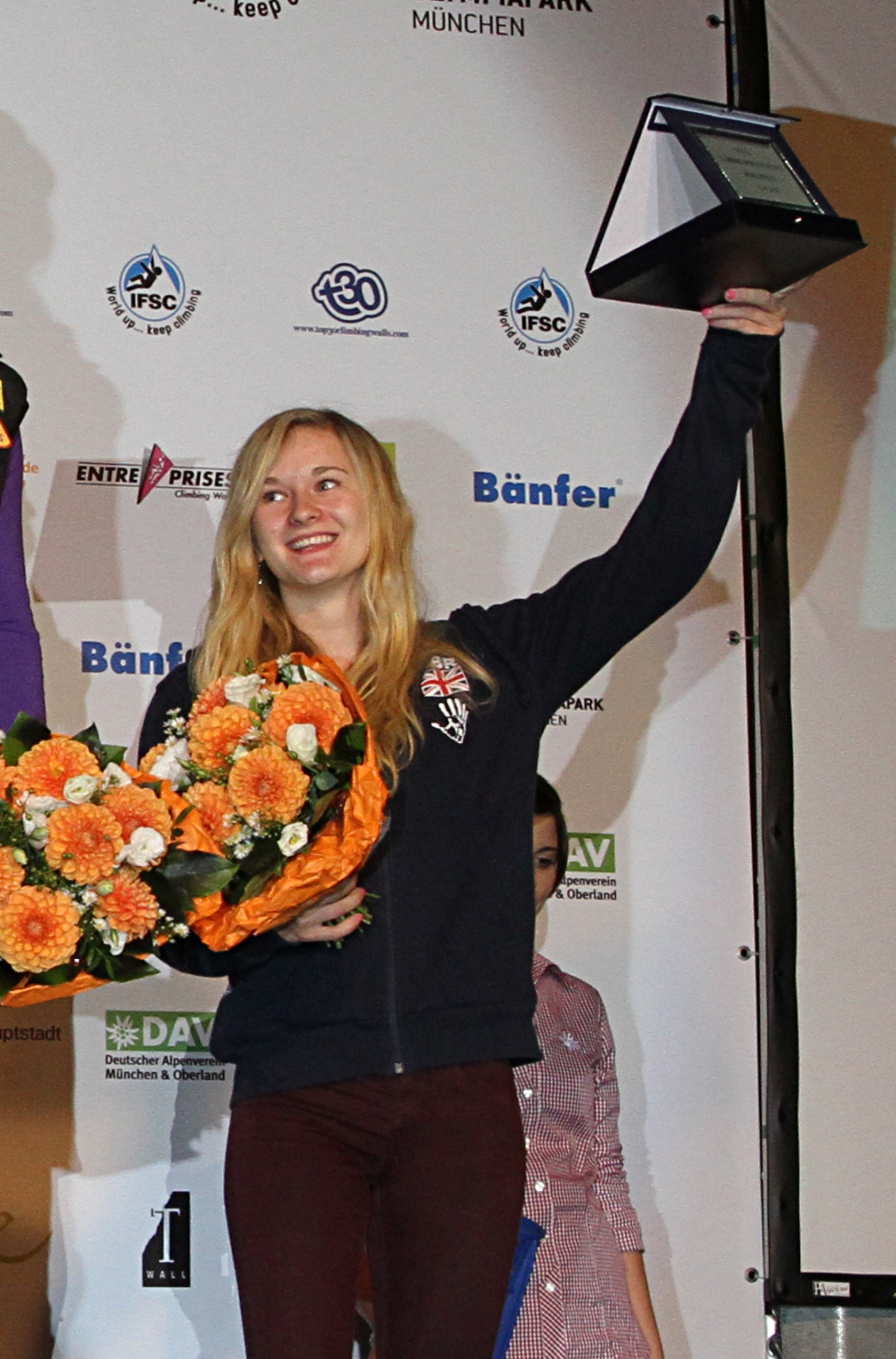 Shauna Coxsey, GBR